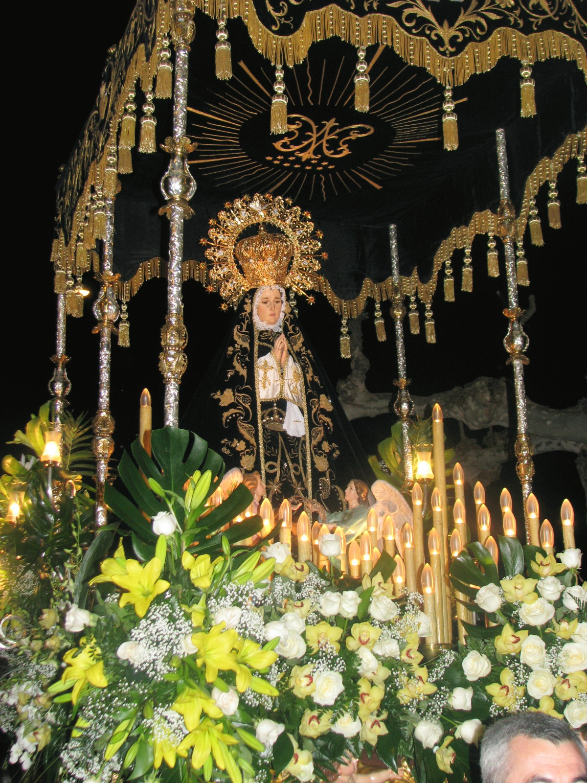 Paso de Nuestra Señora de la Soledad. Semana Santa de Alzira